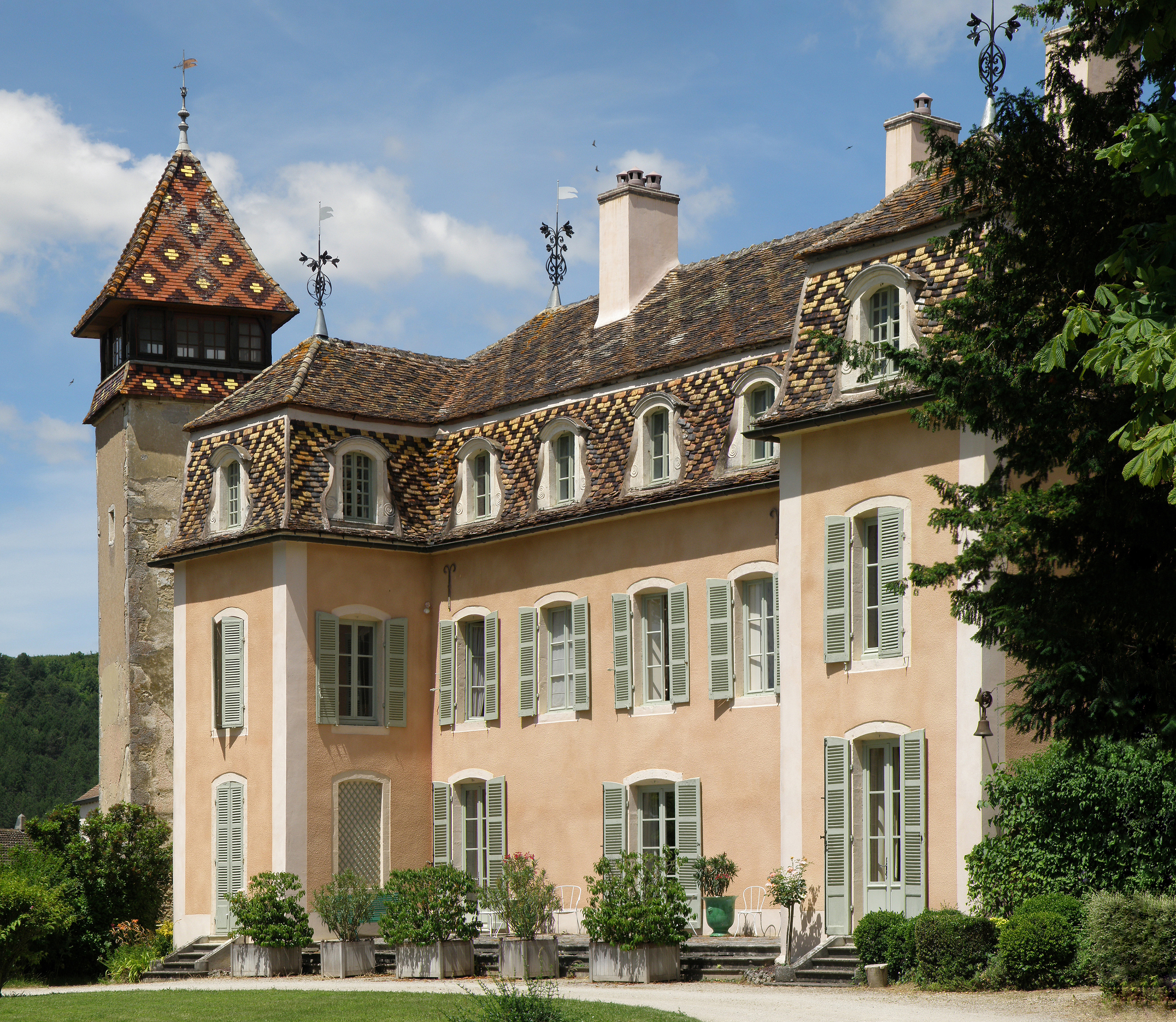 Monthelie (Côte-d'Or, Bourgogne, France). Château, sis Grande Rue. Façade principale.